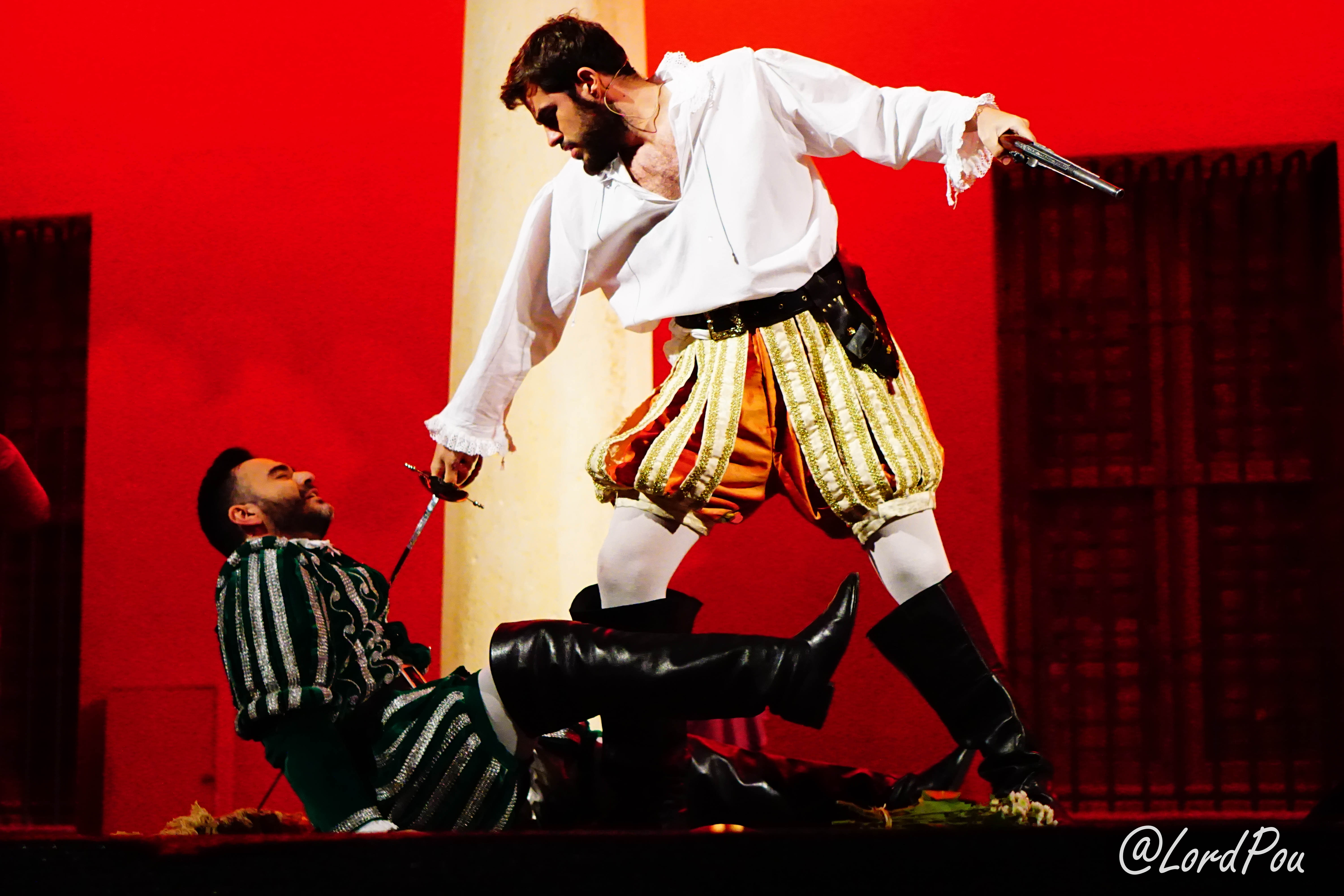 Don Juan Tenorio (Álvaro Nuño) vence en un duelo a espada a Don Luis Mejía (Isaac Urrea) en la quinta de Don Juan This photo has been taken in the country: Spain